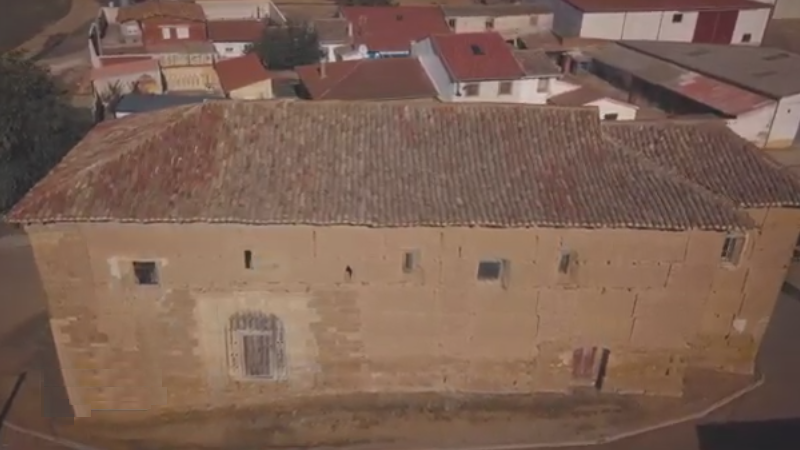 Antigua parroquia de San Pedro, Villalcazar de Sirga